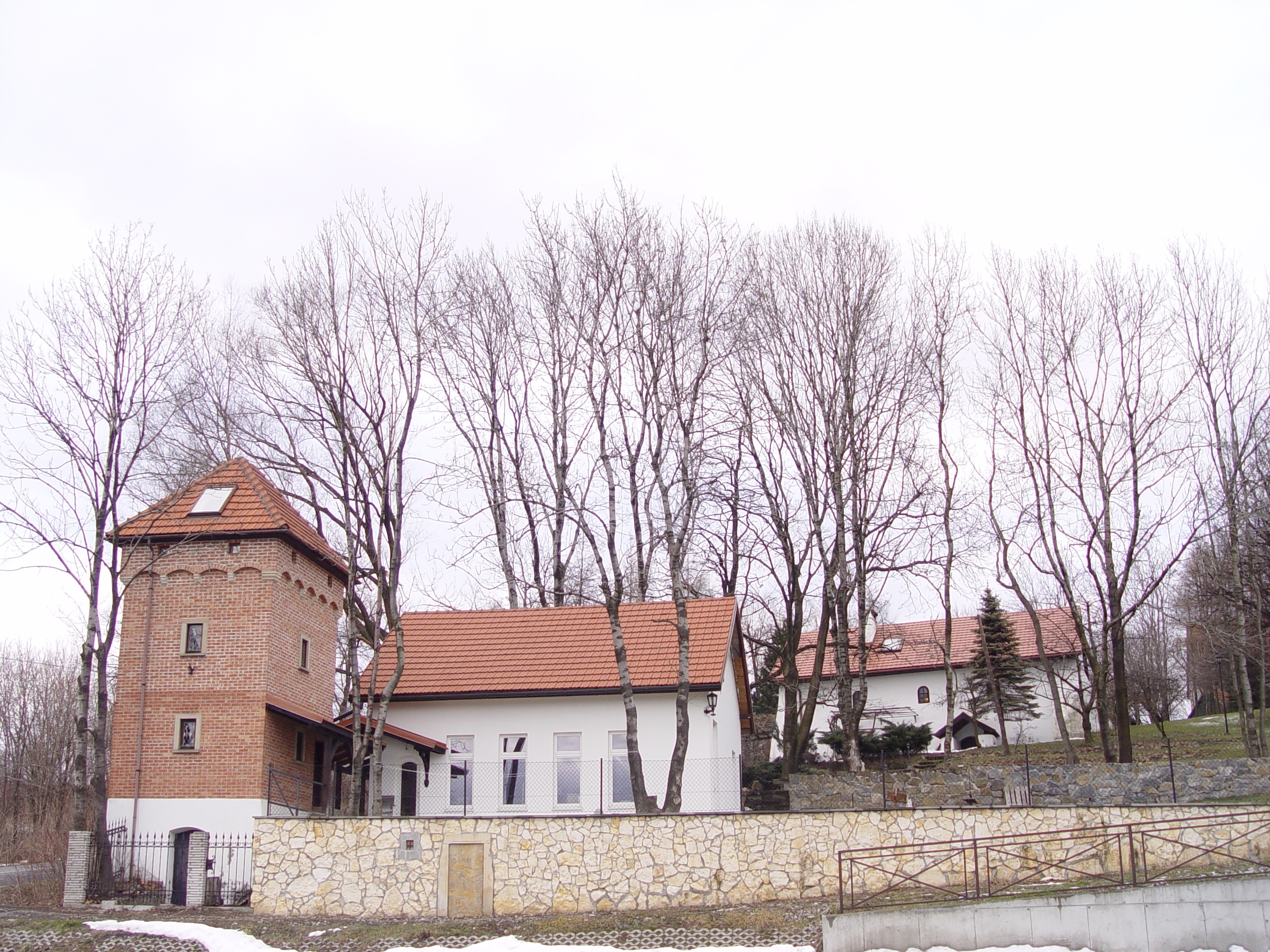 Przydworski budynek gospodarczy